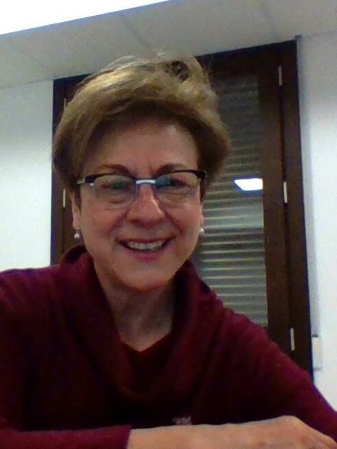 Imagen tomada durante el editatón de la Wikipedia, Granada 2016